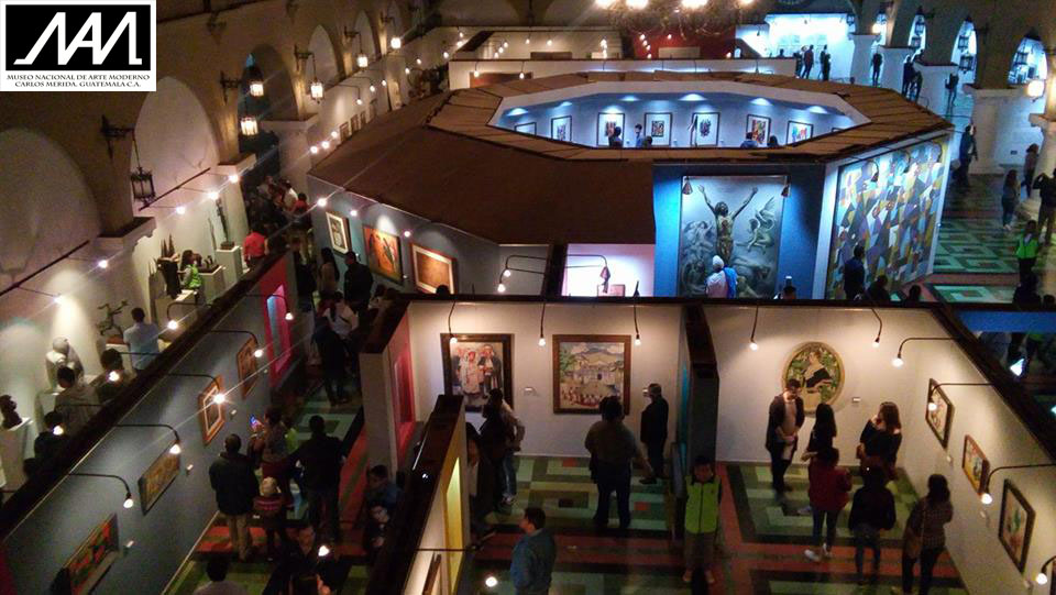 Vista desde la terrasa durante la "Noche de los Museos"